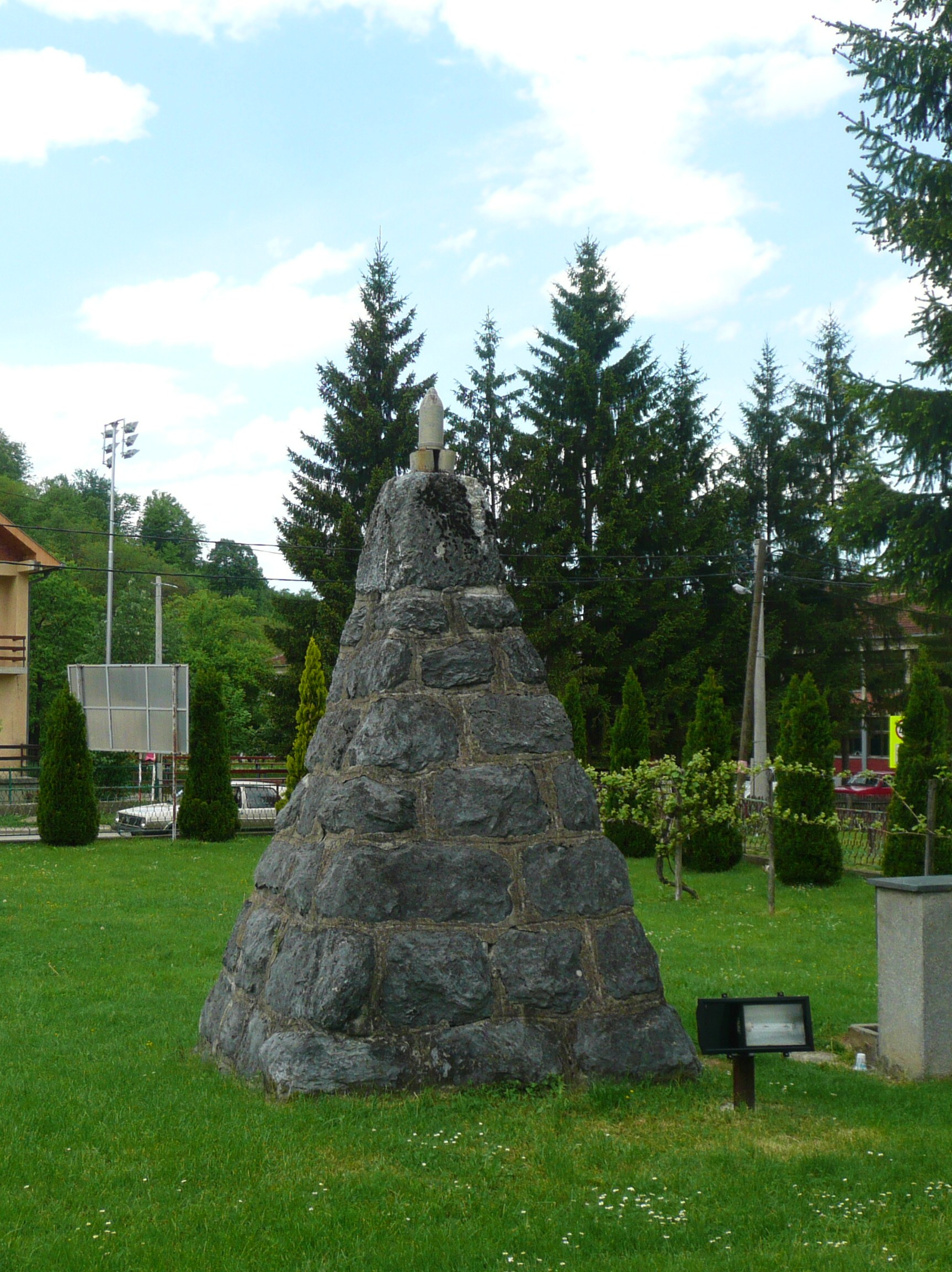 Crkva-spomen kosturnica Uspenja Presvete Bogorodice u Peckoj